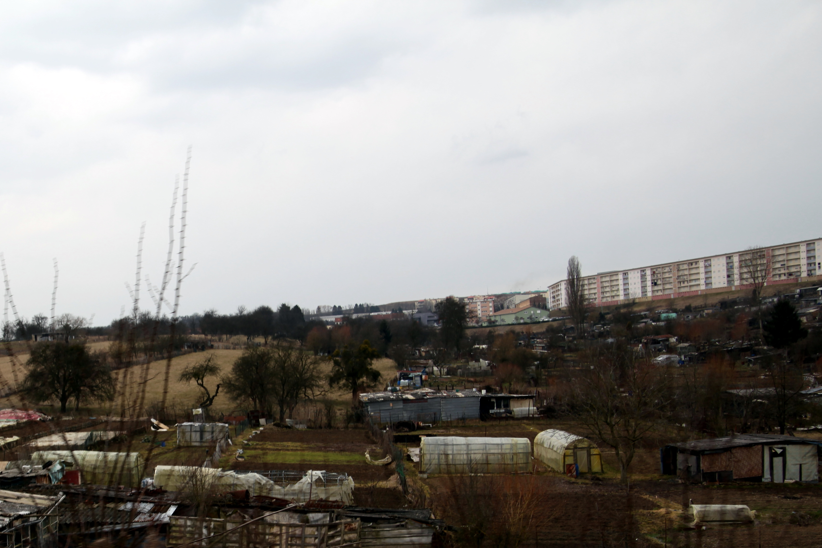 Banlieue von Behren-lès-Forbach. Im Vordergrund diverse Schuppen und Holzhütten. Im Hintergrund die Plattenbausiedlung.